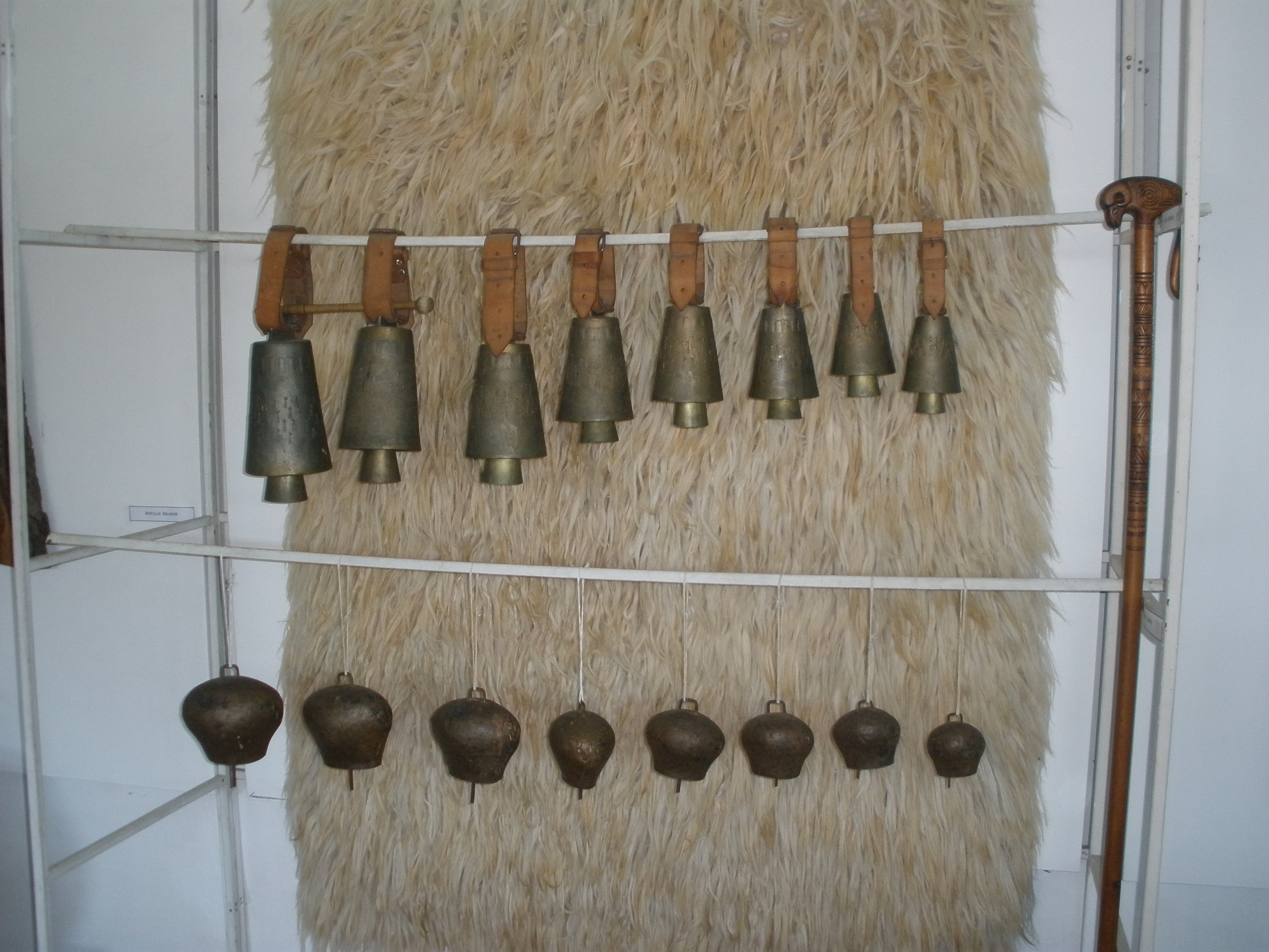 Чанове (горе) и тюмбелеци (долу) изложени на Националното изложение на художествените занаяти и изкуствата село Орешак